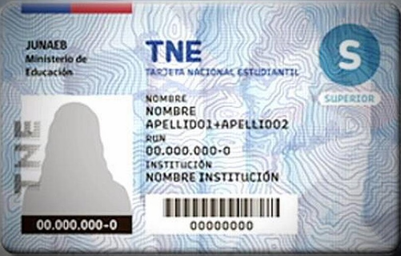 Una TNE de ejemplo real (Superior). La tarjeta cuenta con medidas de verificación como hologramas visibles a simple luz, y la leyenda TNE, visible sólo con luz ultravioleta.